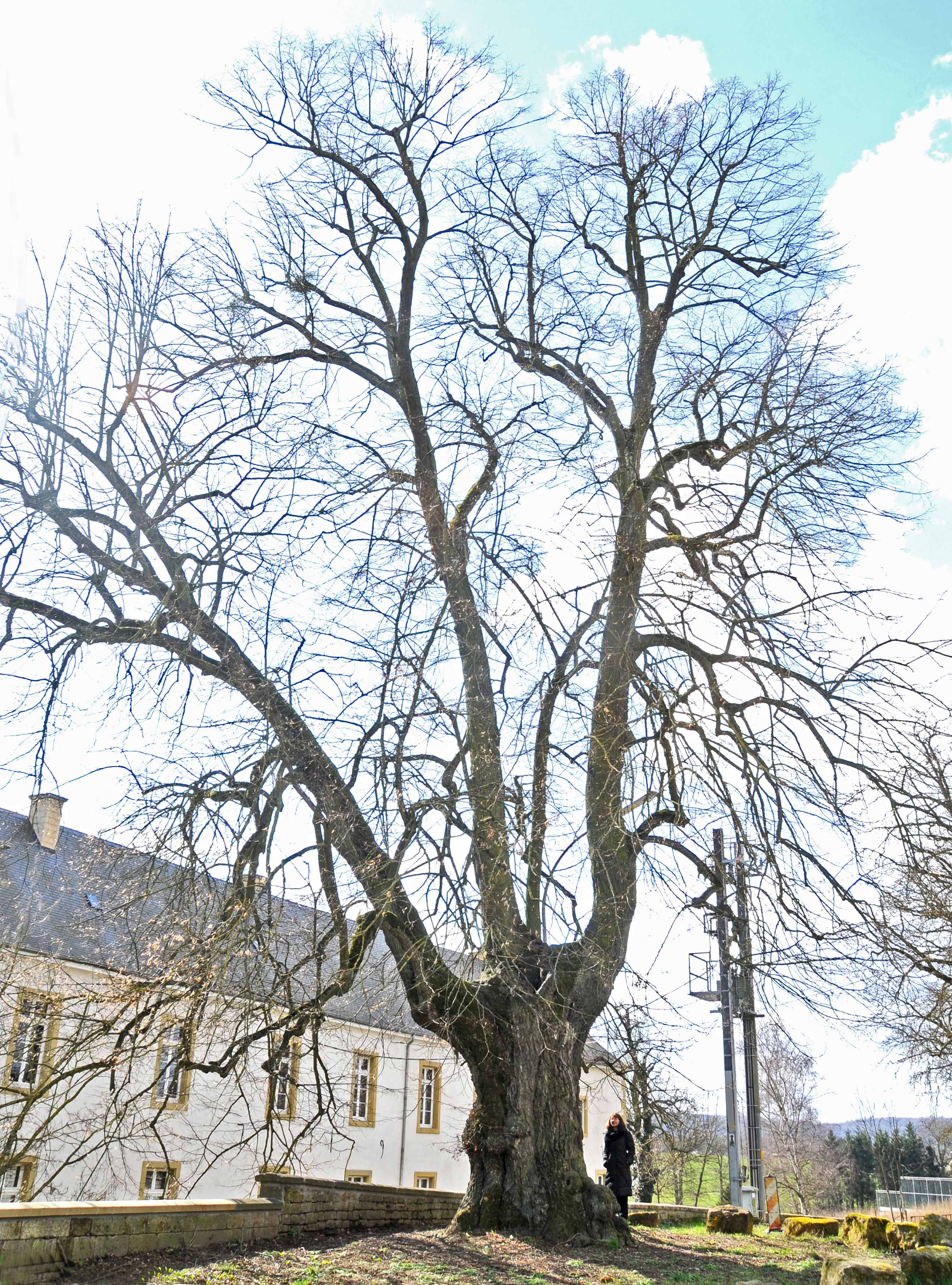 Lann zu Suessem. Suessem + Kategorie:Gemeng Suessem